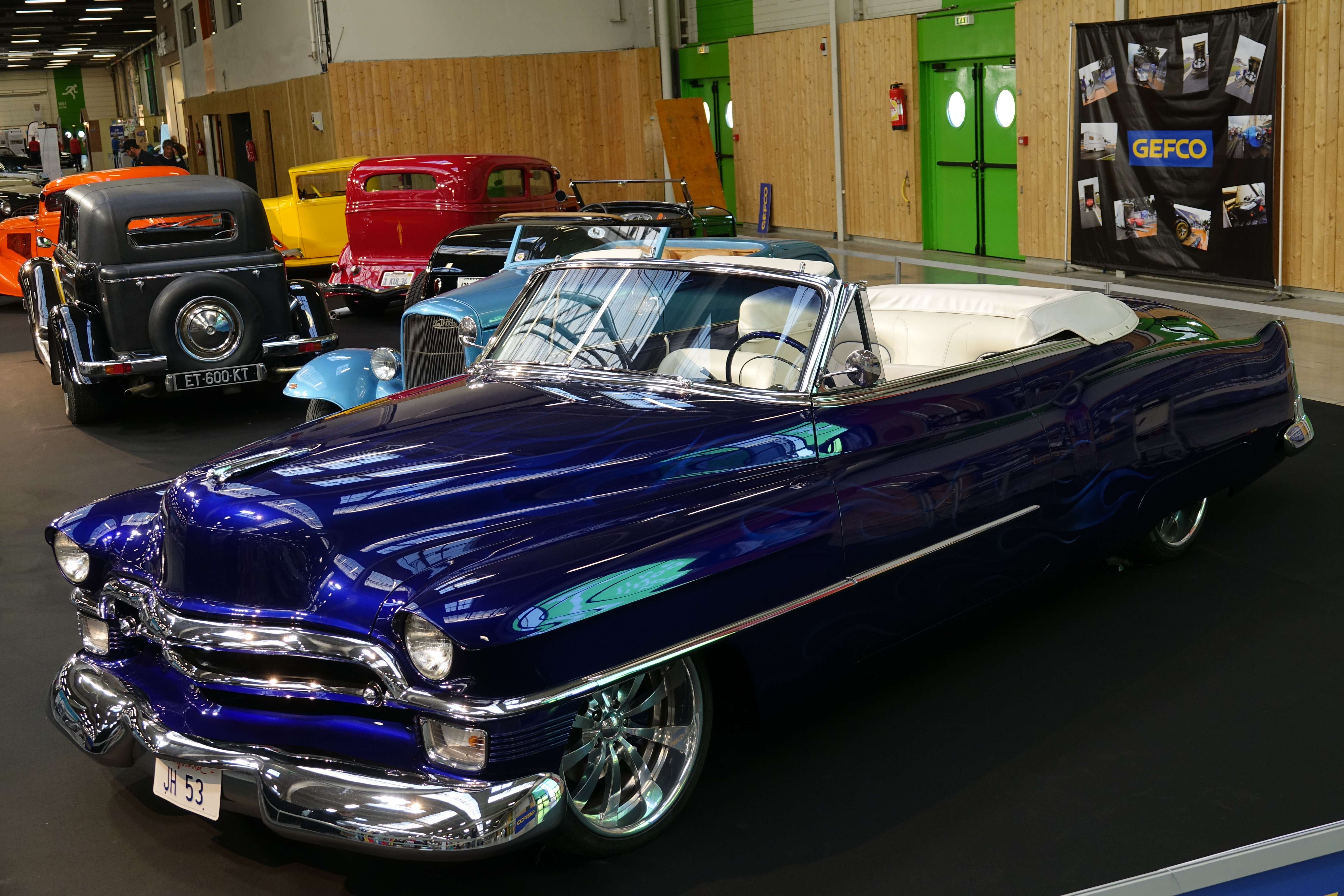 Automédon 2018